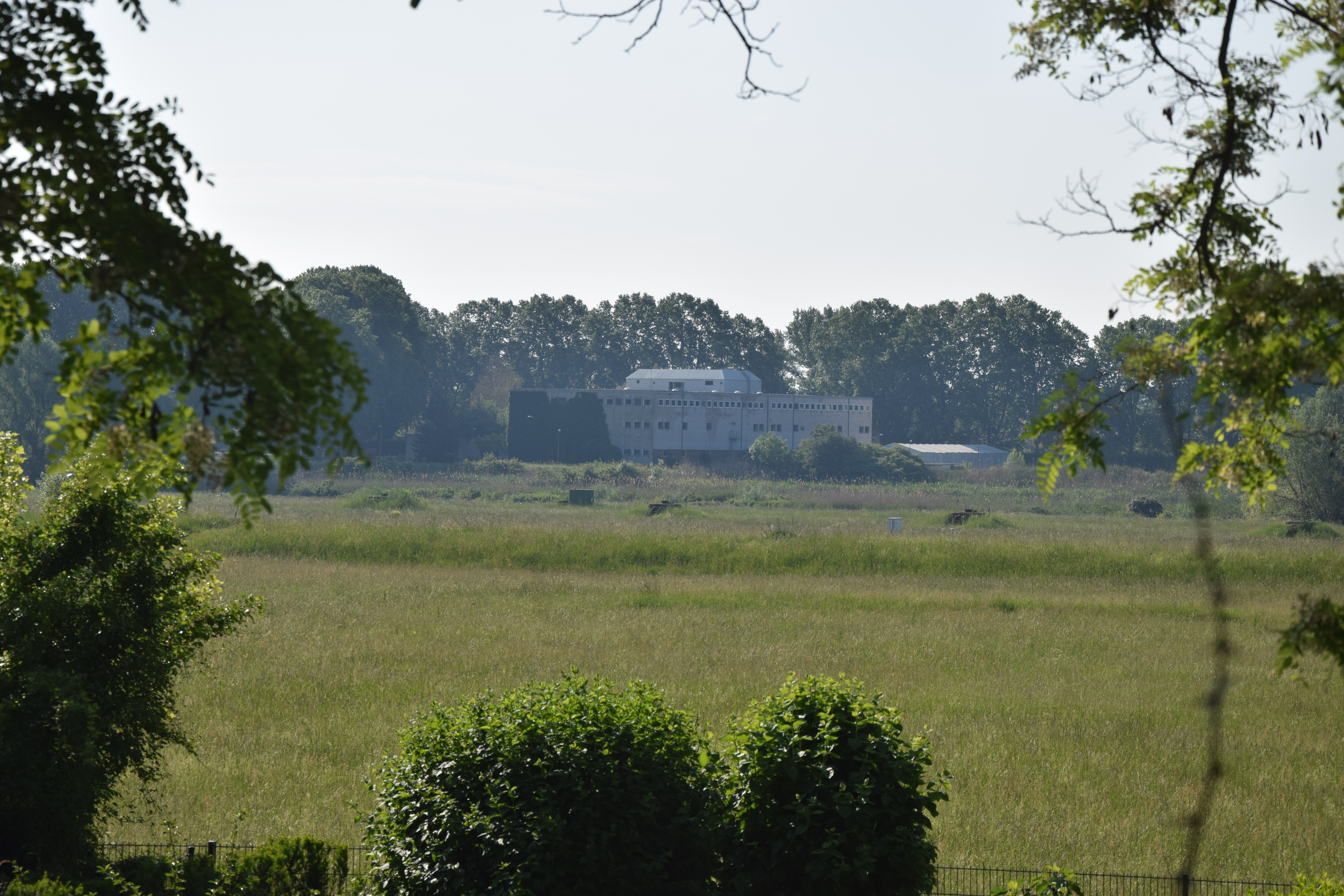 Wasserwerk Schierstein, gesehen von Niederwalluf